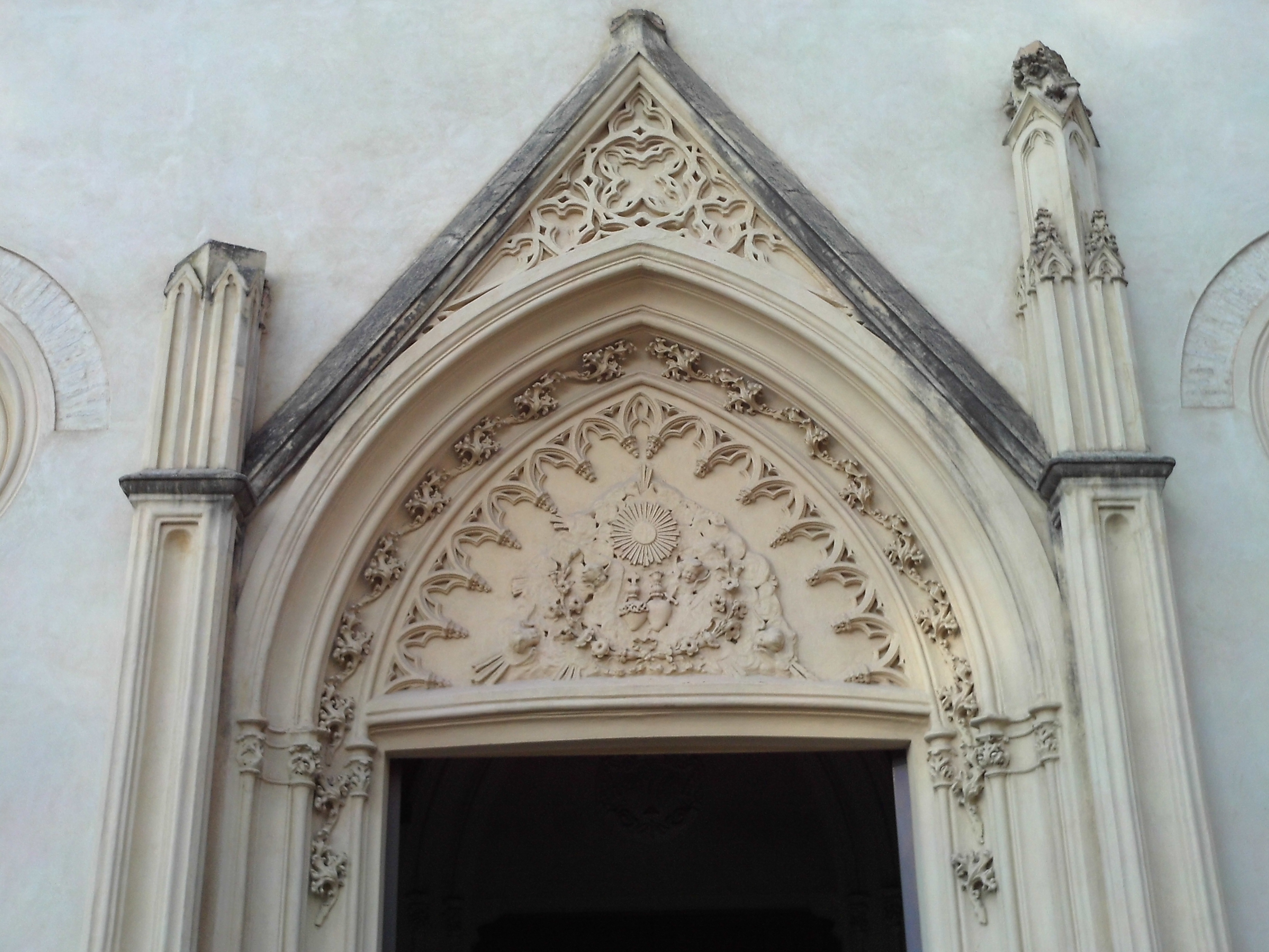 Relieve del Sagrado Corazón de Jesús y el Inmaculado Corazón de María en el frontispicio de la portada delantera del santuario de los Gitanos. Sevilla, Andalucía, España.